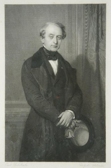 Eugène Schneider (1805-1875), French industrialist